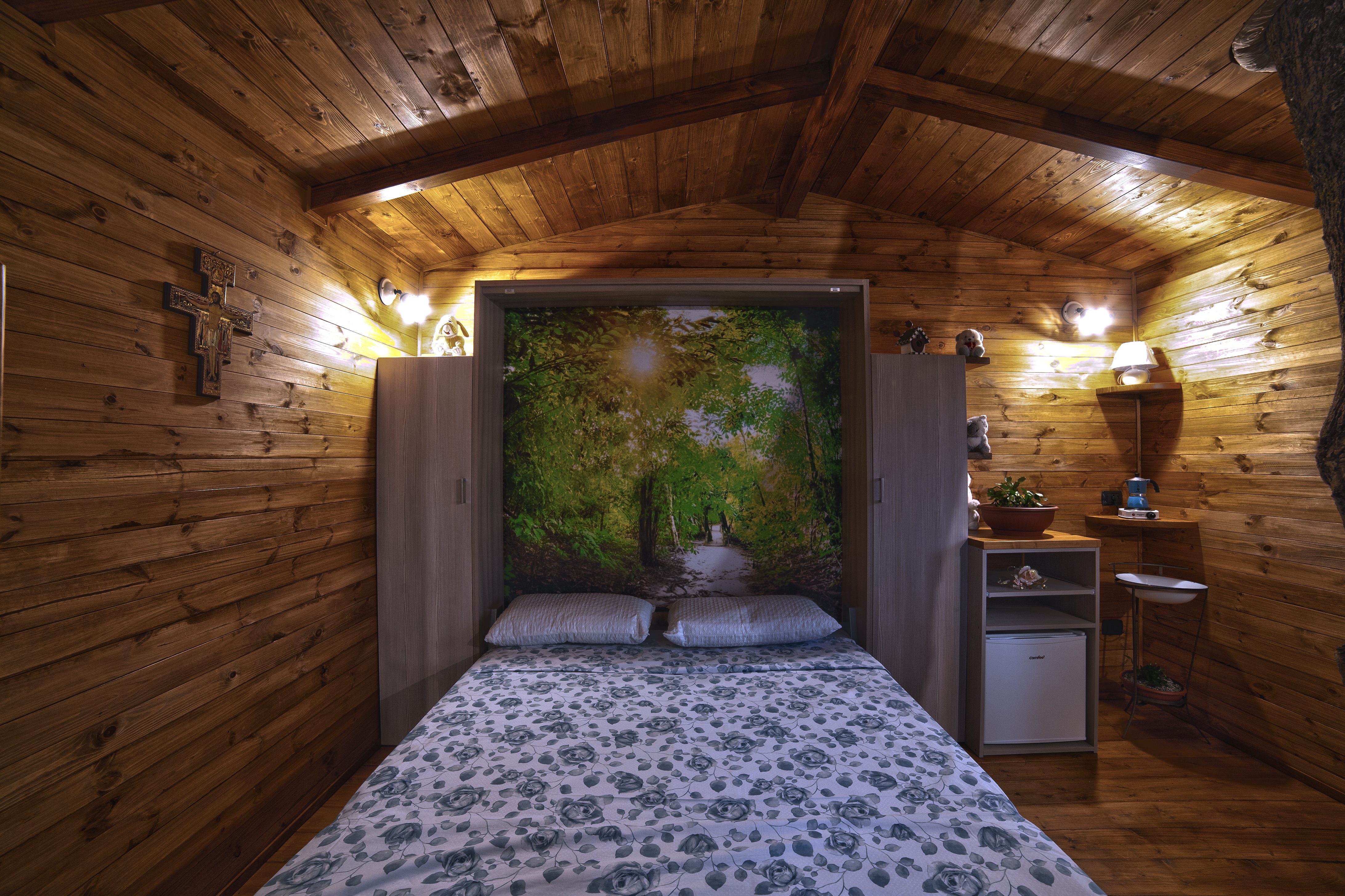 Interno casa sull'albero - Rogliano CS